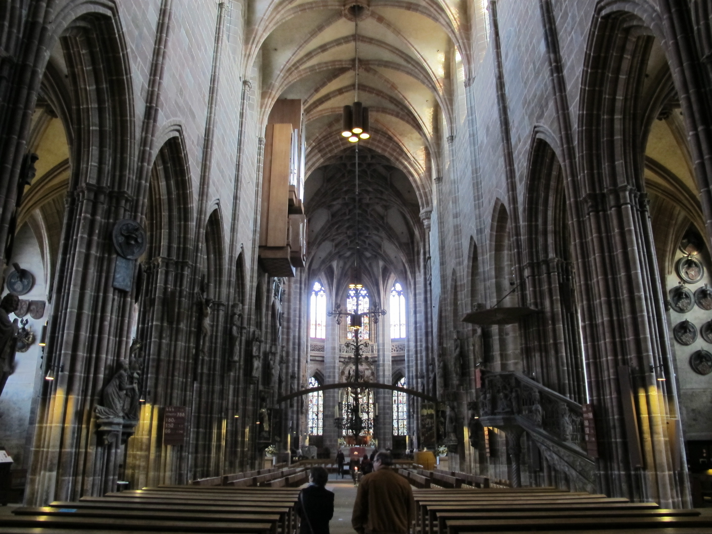 St. Lorenz, Nuremberg, interior